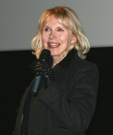 Bulle Ogier à l'avant-première de Passe-passe diffusée à l'UGC Ciné Cité Les Halles, à Paris.